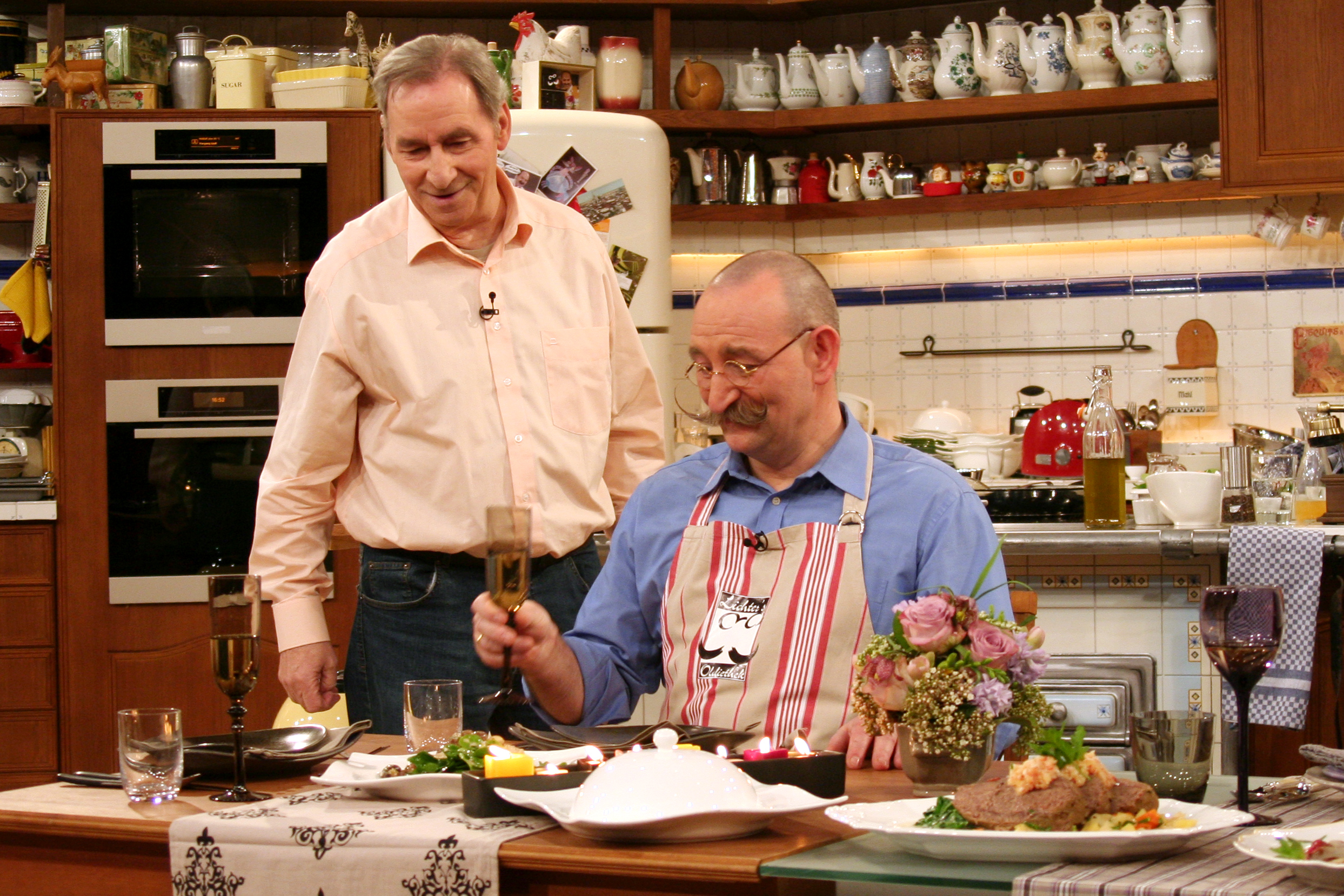 Henry van Lyck und Horst Lichter. Fernsehaufzeichnung Lafer Lichter Lecker